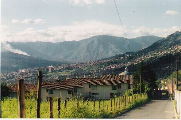 Fotografía personal, Albeiro Rodas, visa del Valle de Aburrá desde Medellin, para el artículo pertinente. Donación a la wikipedia.